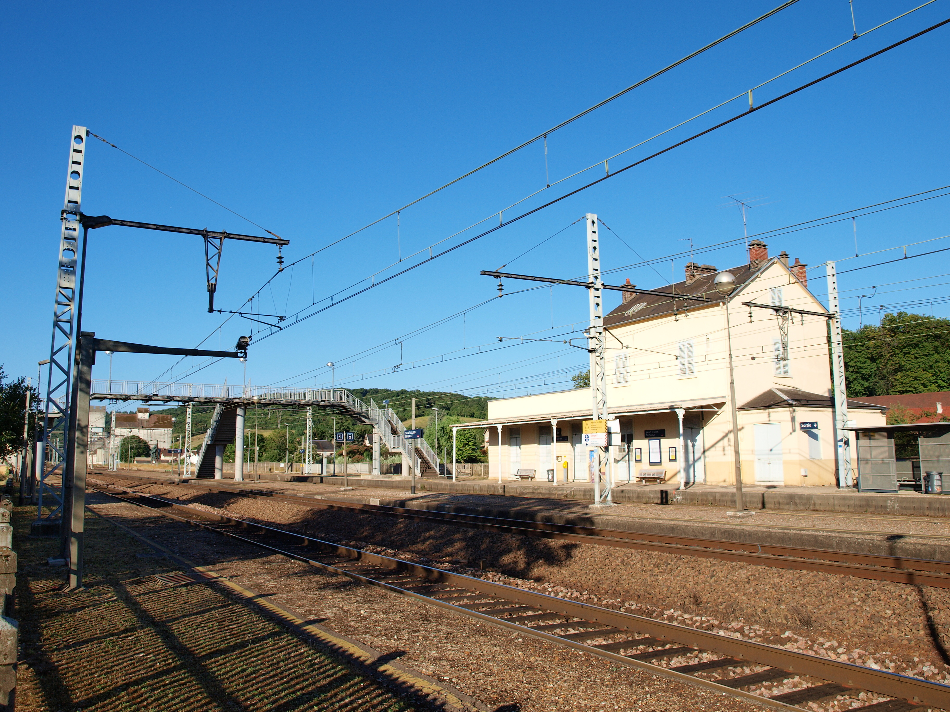 Gare de Saint-Julien-du-Sault (Yonne, France) : les quais